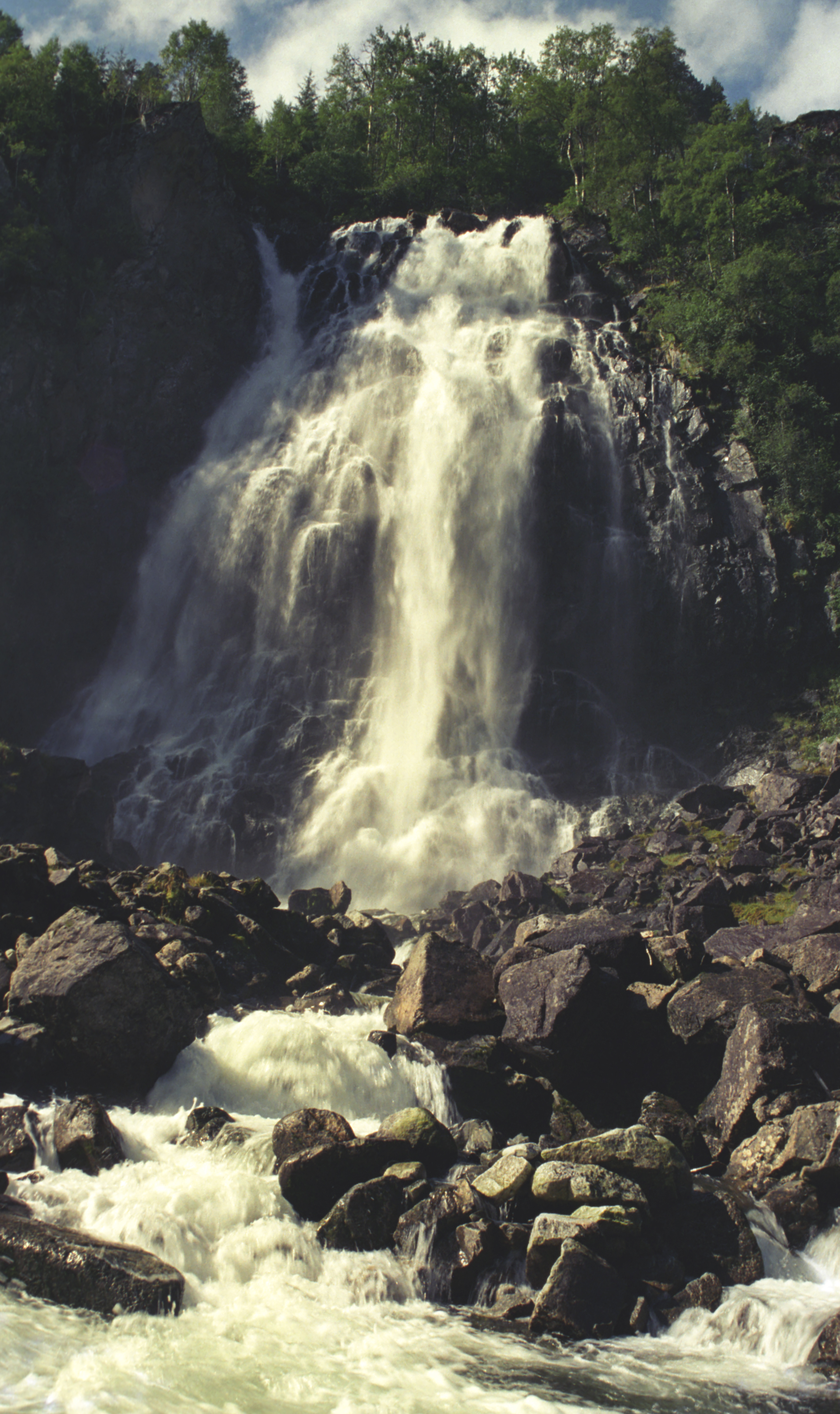 Wodospad Espelandsfossen w dolinie Odda